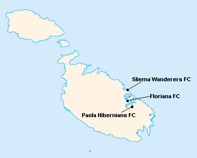 Répartition des clubs en First Division Maltaise 1935-1936.